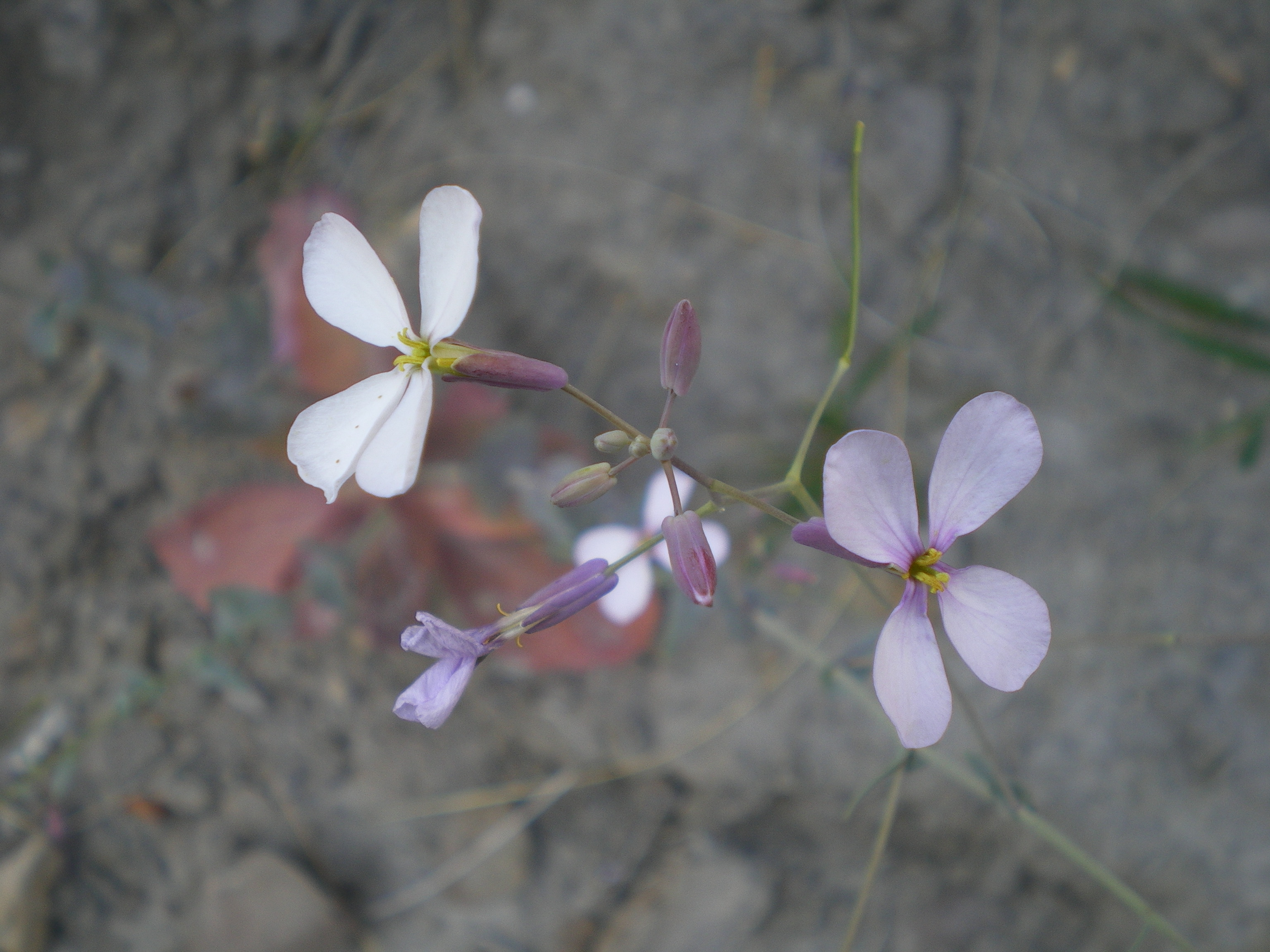 Fotografía de detalle de las flores y capullos de Moricandia foetida, planta perenne de la familia de las Crucíferas o Brassicáceas, tomada en el subdesierto de Tabernas, provincia de Almería, España.